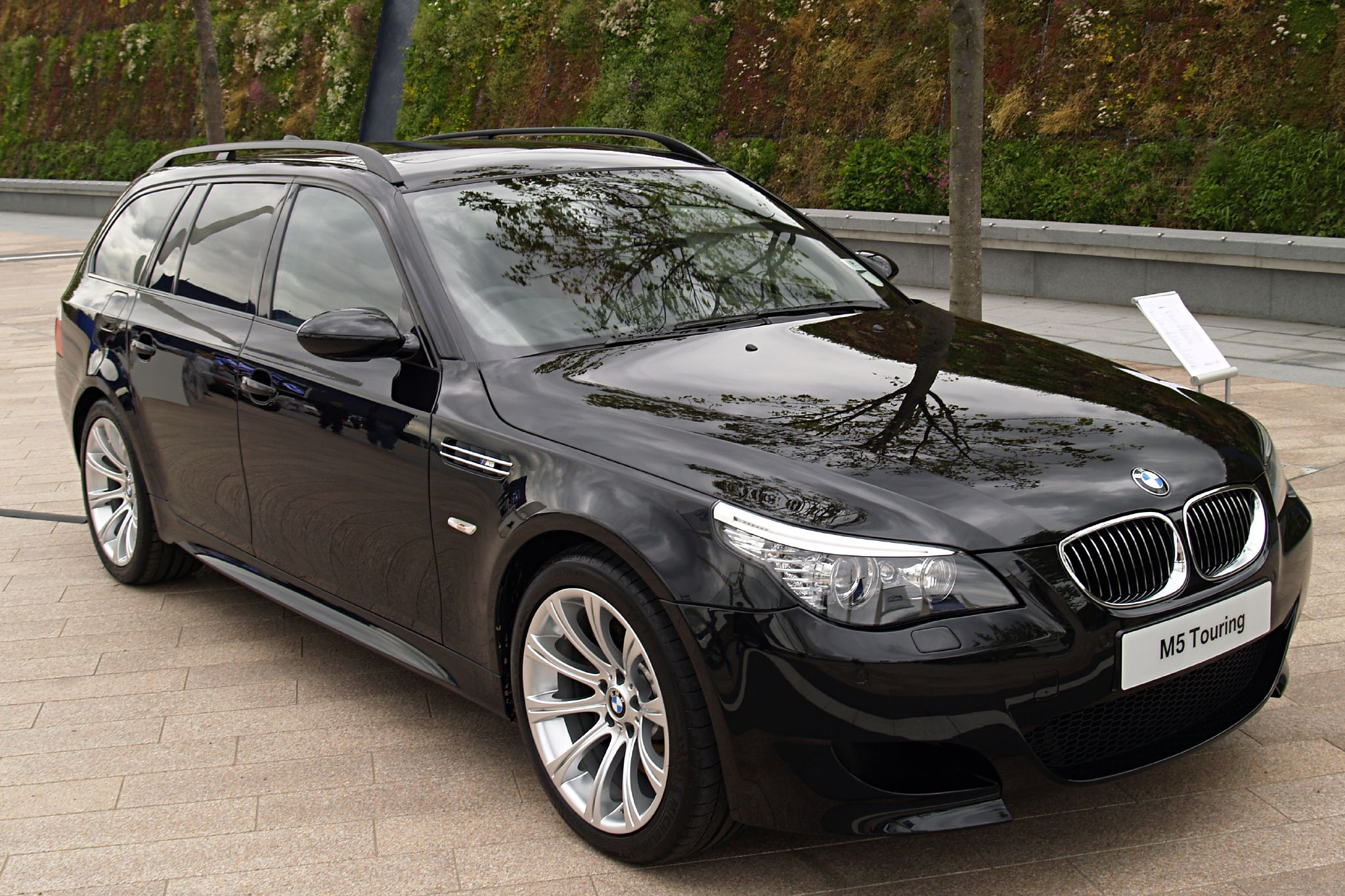 BMW POWER JULY 07 Peninsula Square O2